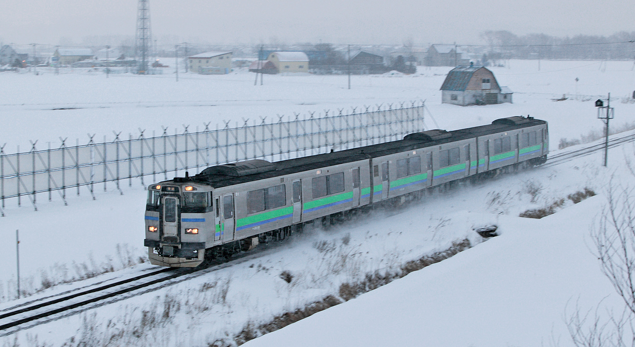 JR Hokkaido 201 series DMU on the Sasshō Line ( Ishikari Futomi Sta. ~ Ainosato koen Sta. ).